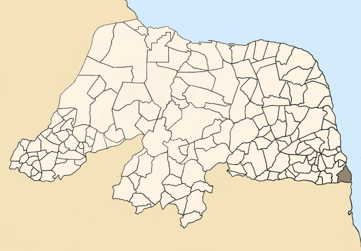 Mapa do Rio Grande do Norte (Brasil) com o município de Baía Formosa em destaque. Map of the brazilian state of Rio Grande do Norte, showing Baía Formosa. Imagem tratada com o GIMP. Image made with GIMP.